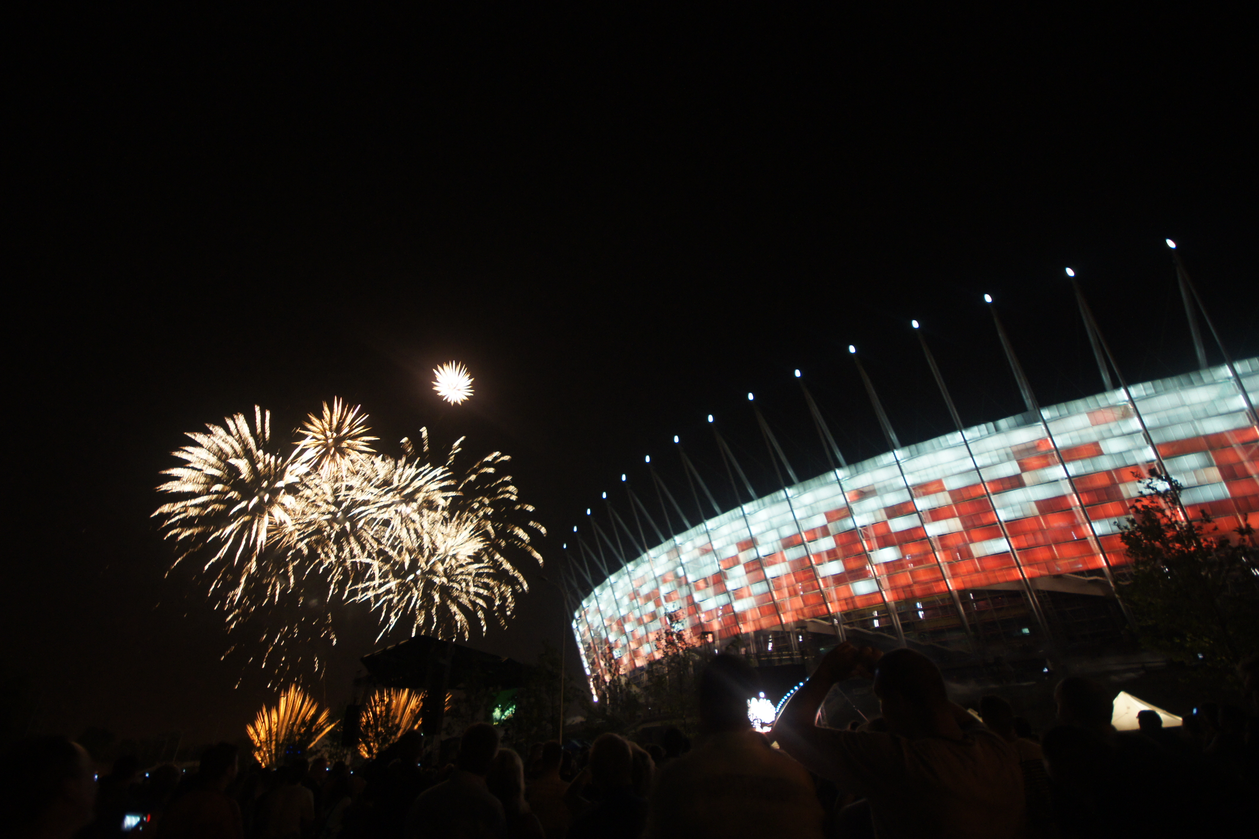 Stadion Narodowy w czasie pokazu świetlnego